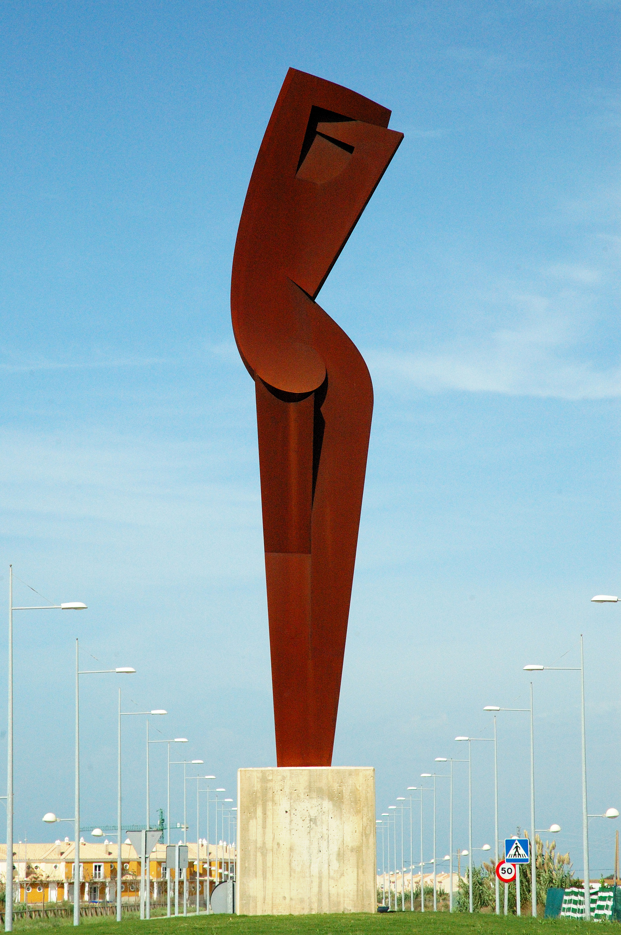 Monumento a la mujer. Rota (provincia de Cádiz). Año 2005.